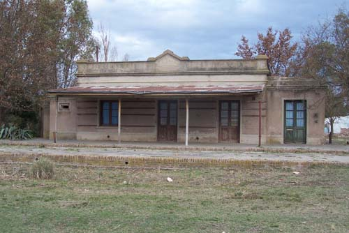 Estación Ariel (FCPBA)